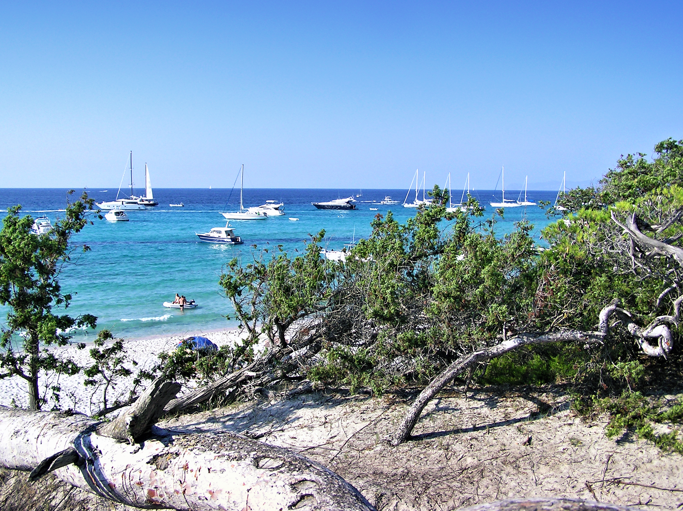 Santo-Pietro-di-Tenda (Corse) - Plage de Saleccia avec dunes à genévrier